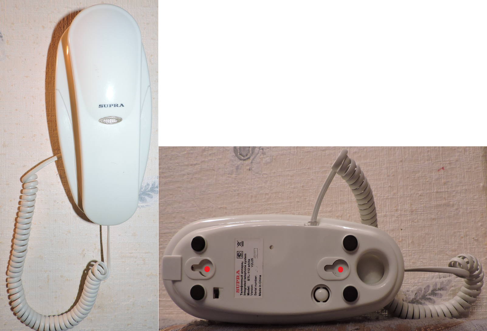 Настенный телефон и его крепления (показаны красными точками)